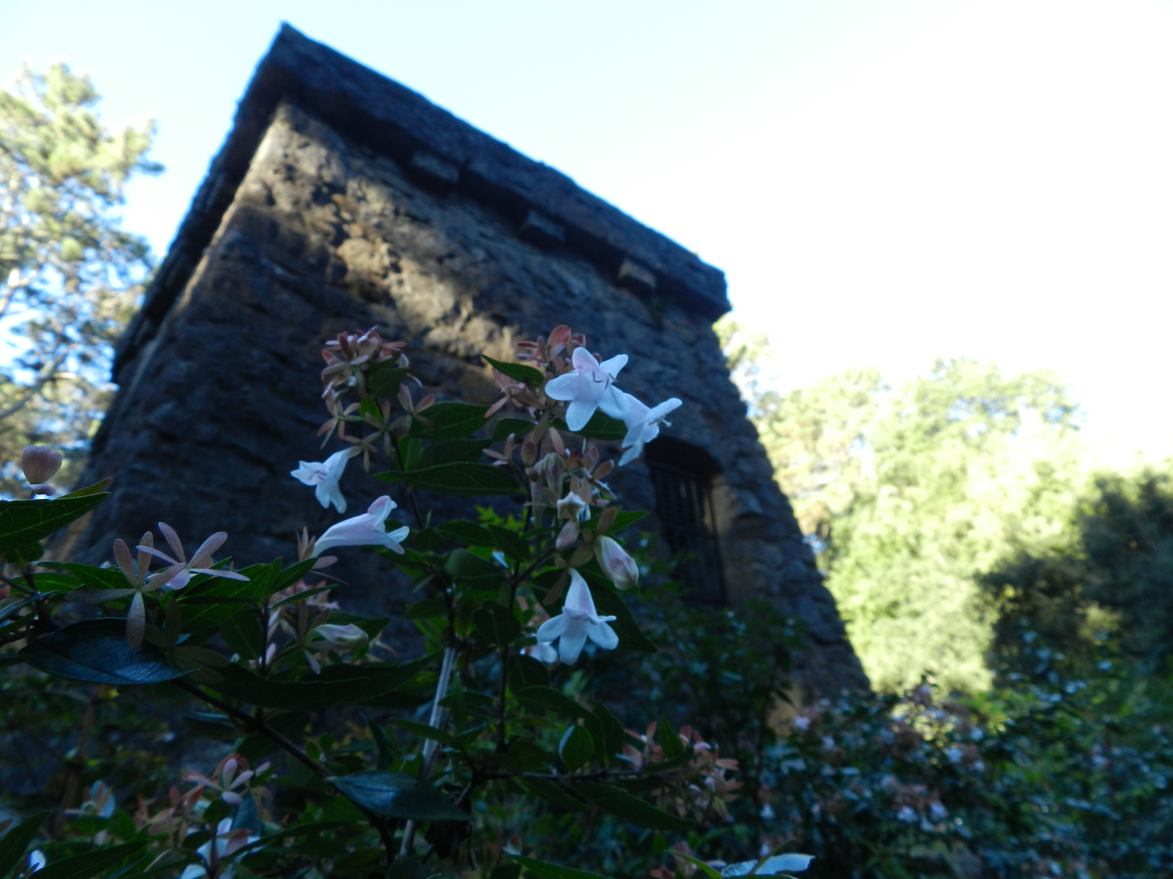 Mirador Alemán en proceso de conservación y protección, año 2017.